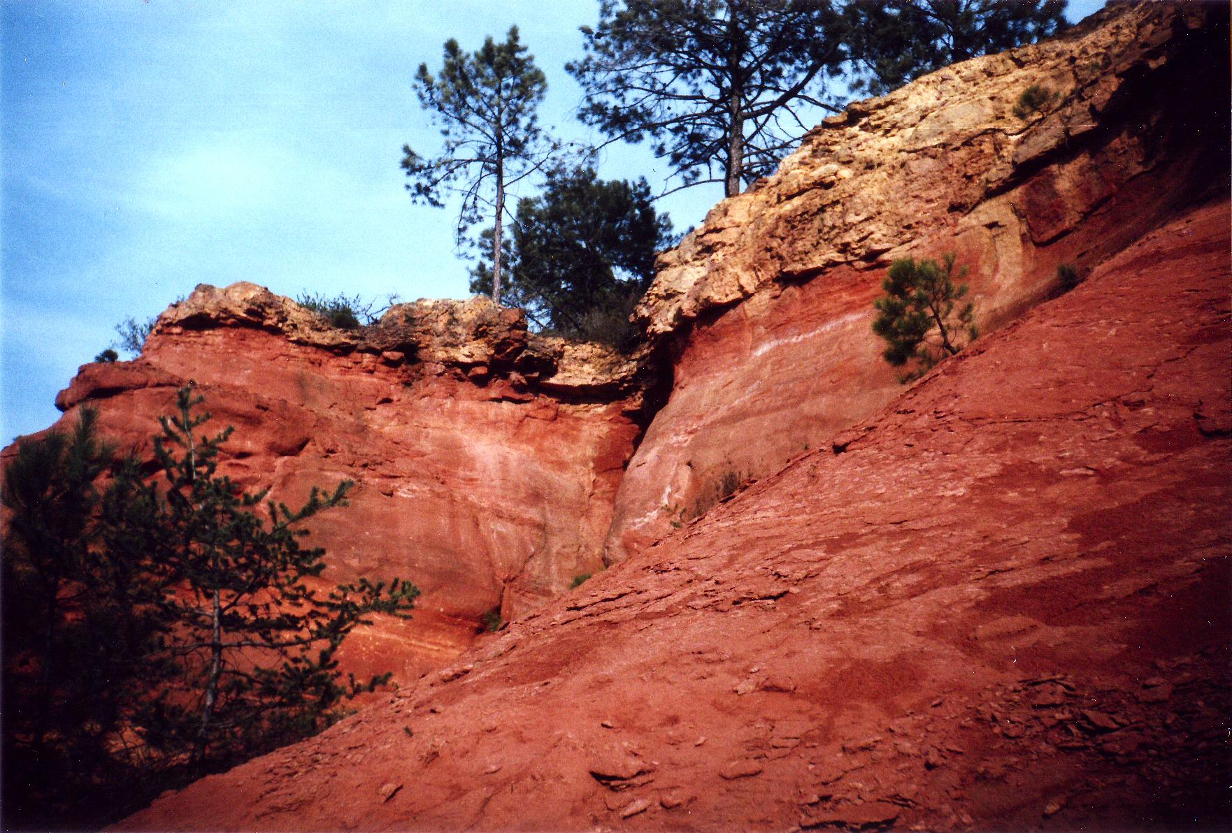 Ockerfelsen bei Roussillion